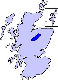 Историческая область Баденох, Шотландия Примерные границы исторической области Баденох, Шотландия